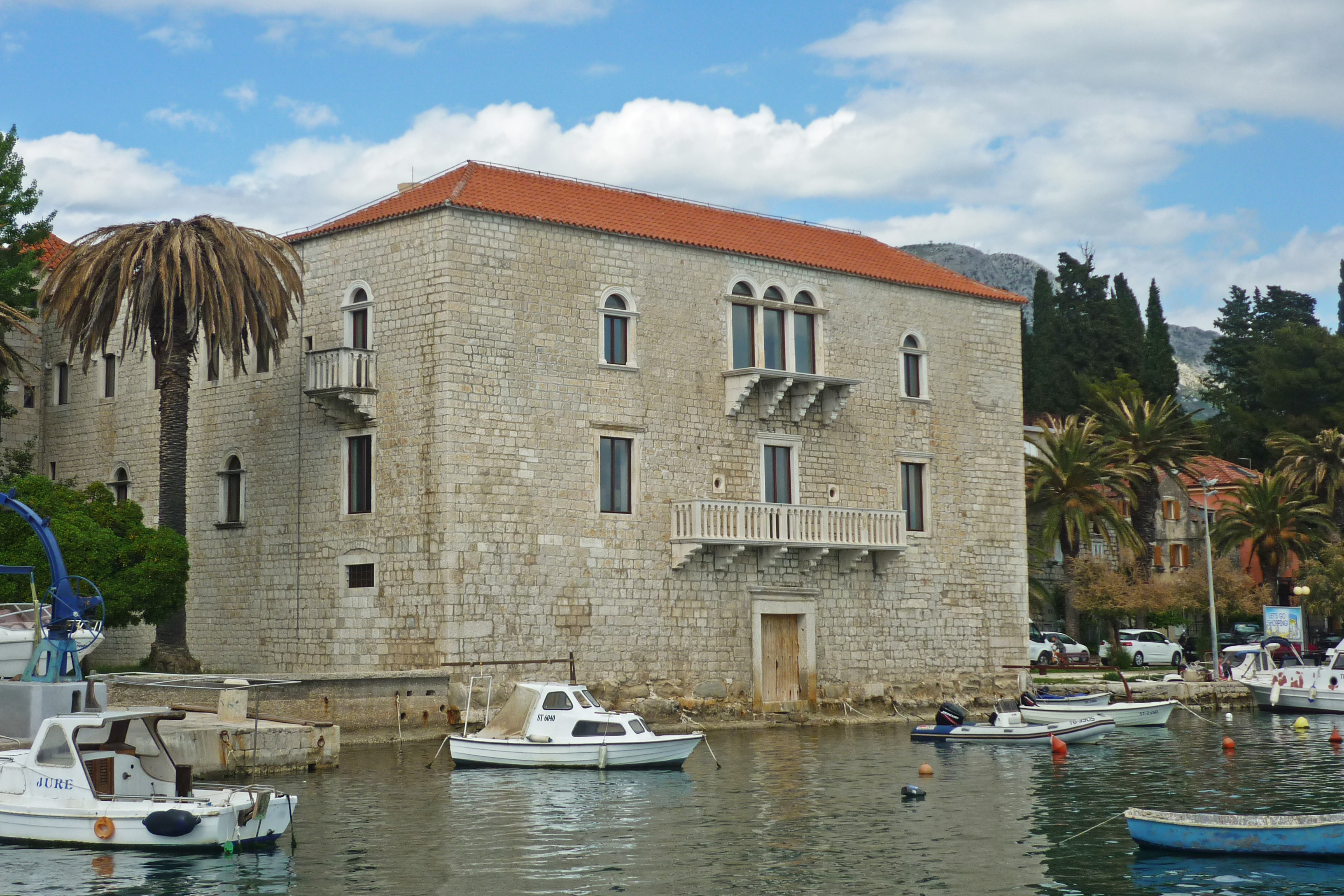 Kaštel Lukšić mit dem Kastell Vitturi